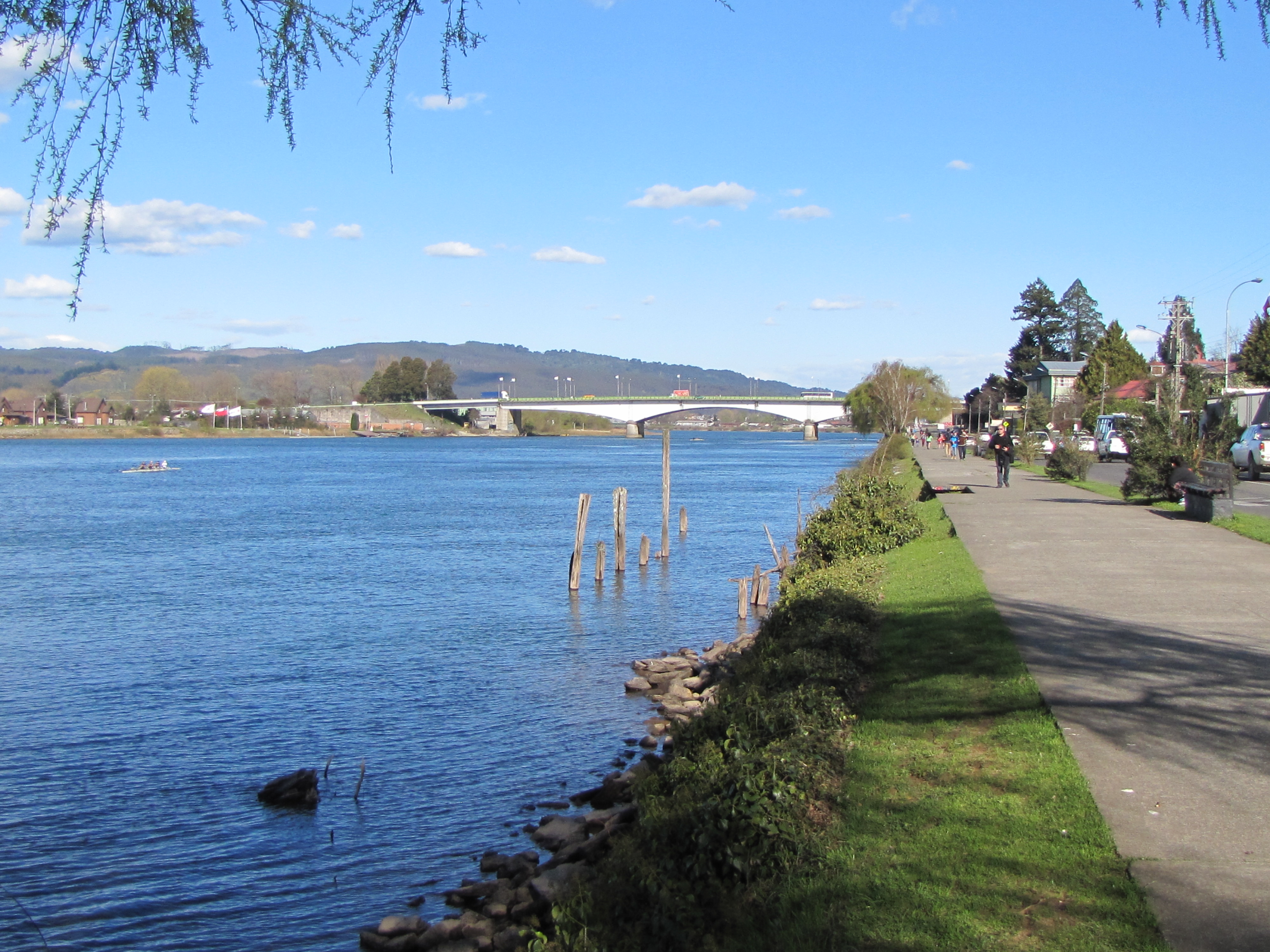 Puente de Las Ánimas y costanera en el río Callecalle, Valdivia, Chile